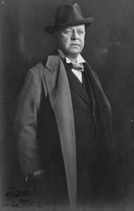 Fredrik Hedlund (1864-1927)